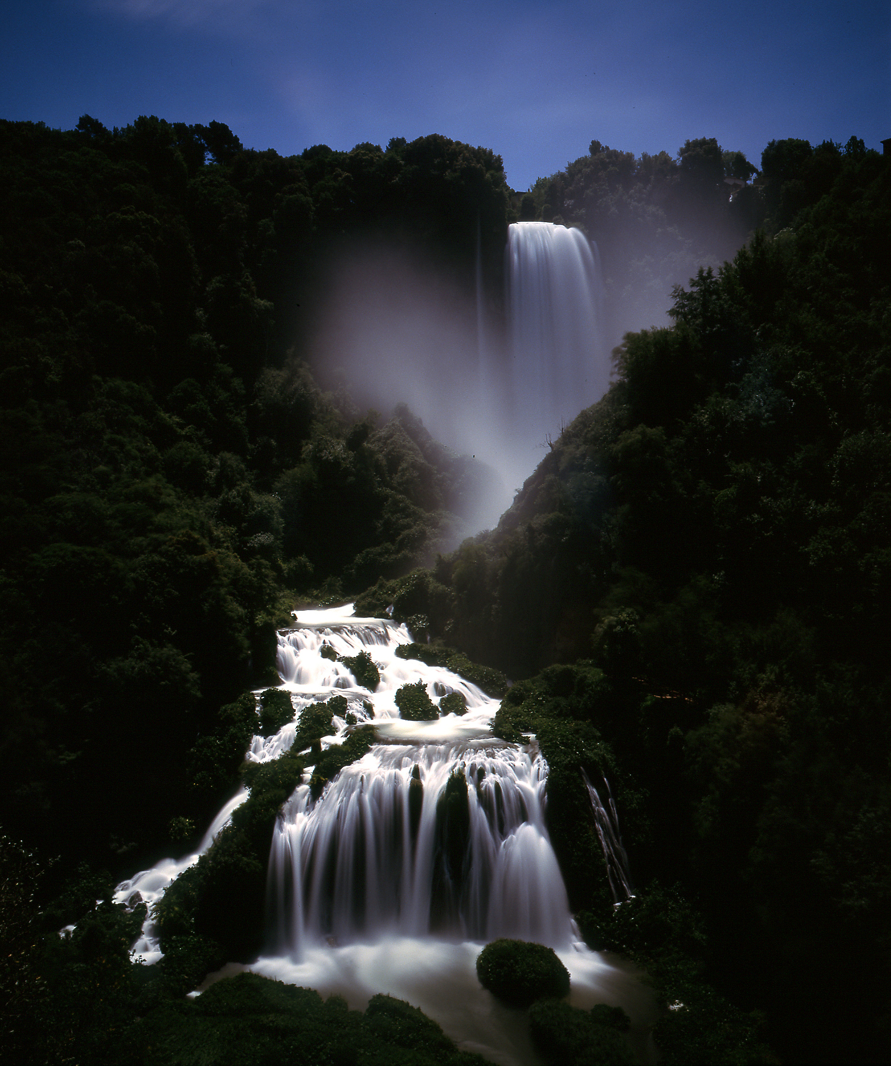 Cascata delle Marmore fotografata con Mamiya7 e ottica 43mmf4,5, filtro neutro, velvia50. This is a photo of a monument which is part of cultural heritage of Italy.